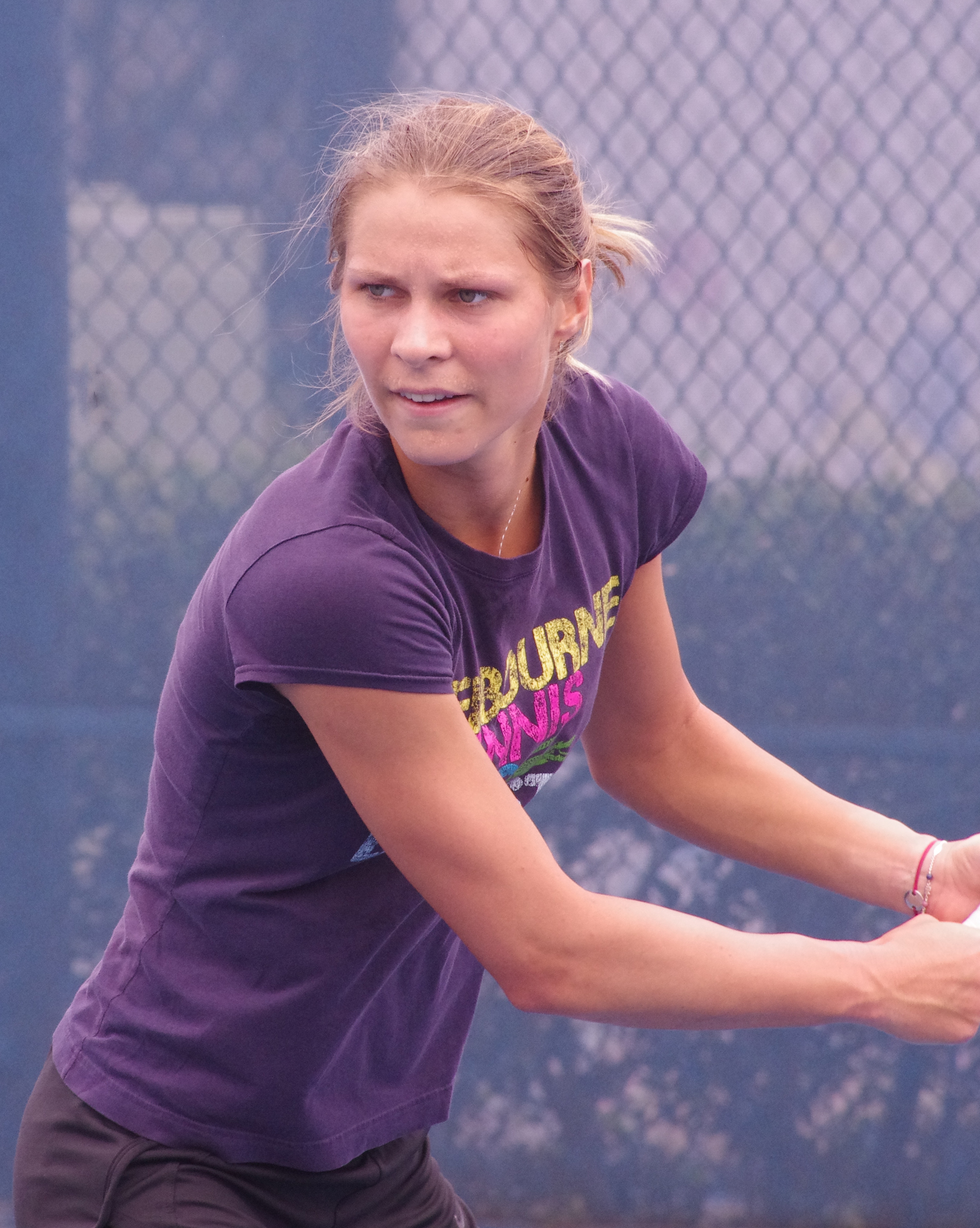 Katarzyna Piter